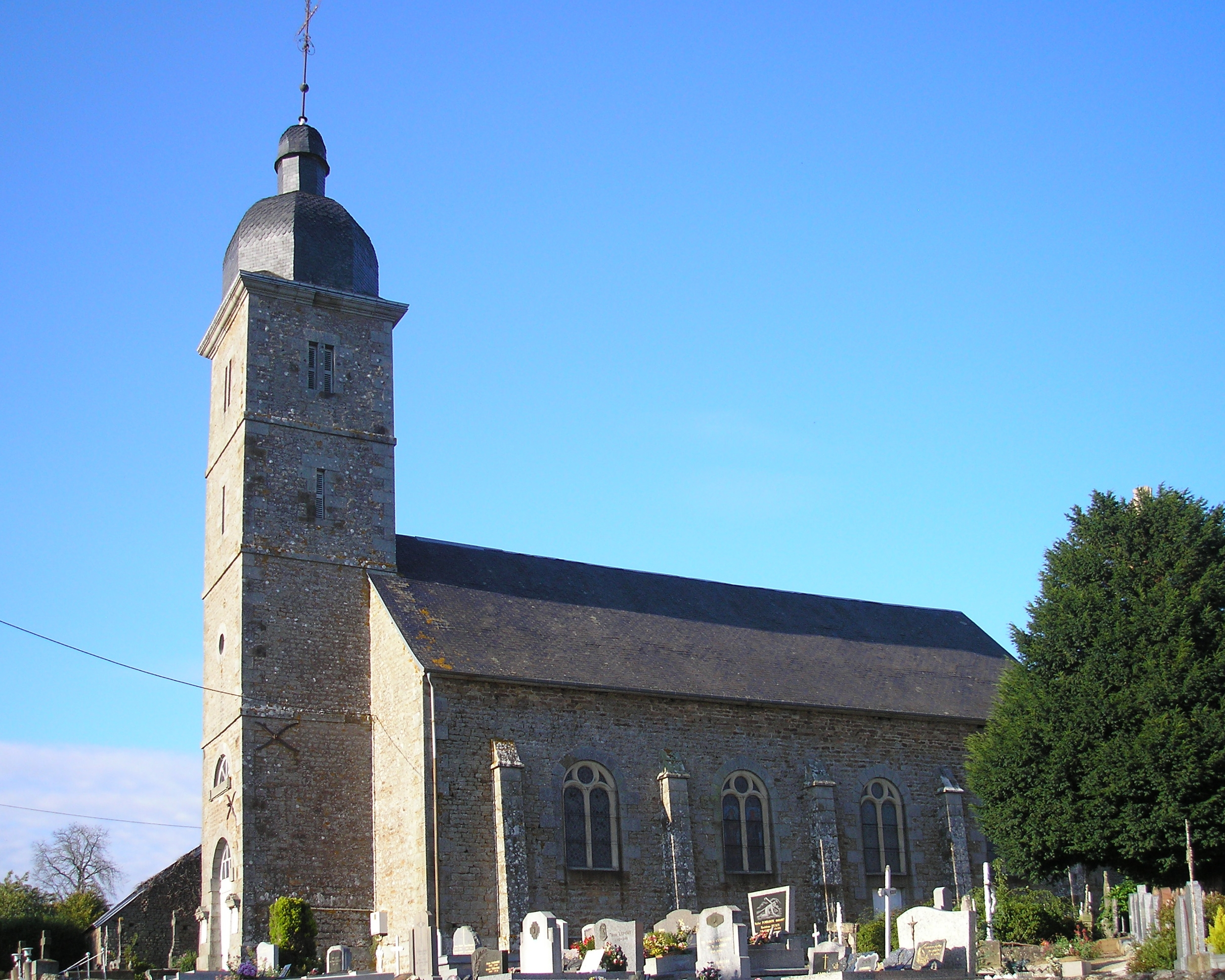 La Lande-Saint-Siméon (Normandie, France). L'église Saint-Siméon.